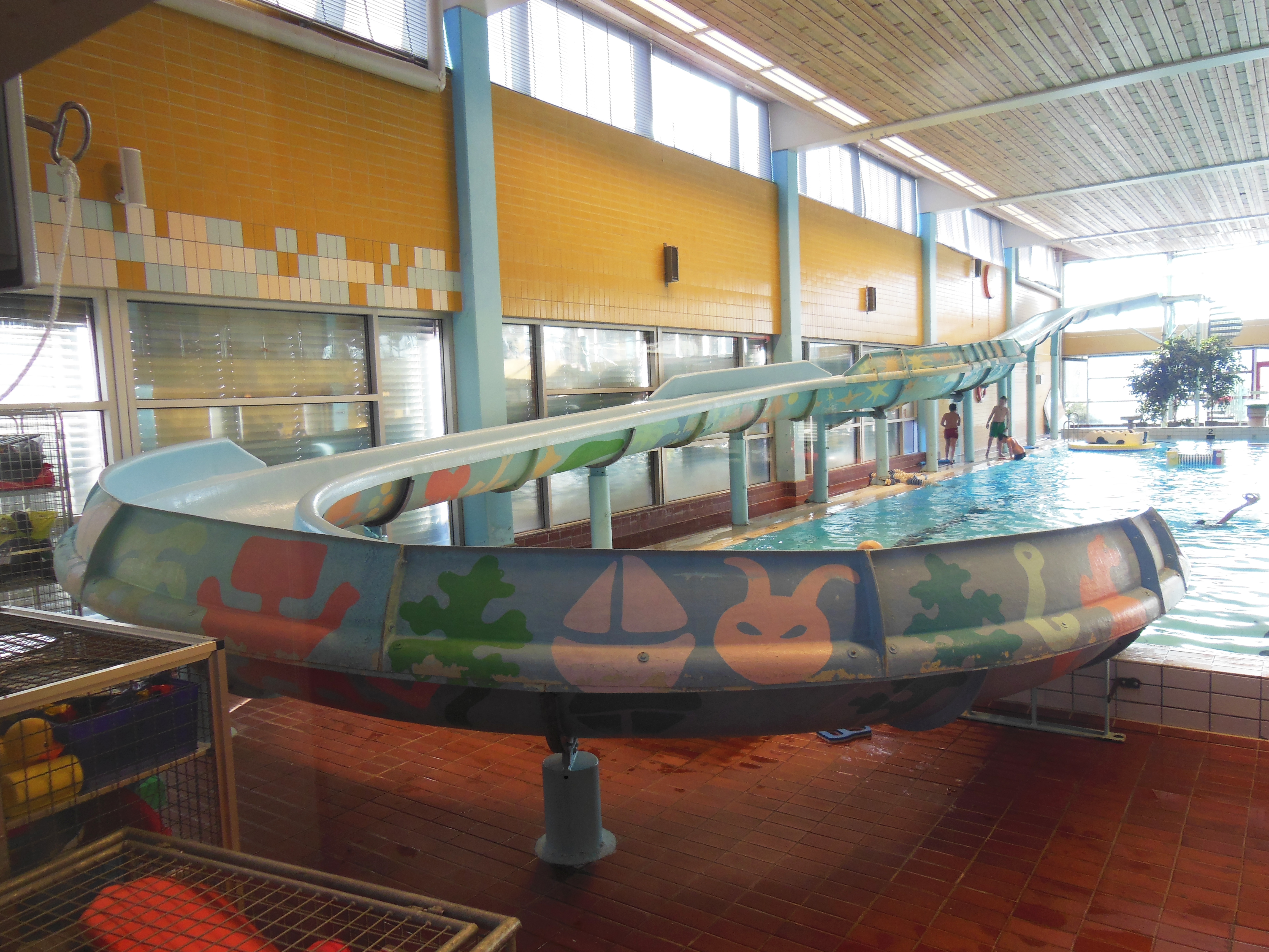 Frölundabadets rutschkana fotograferad genom en glasruta.